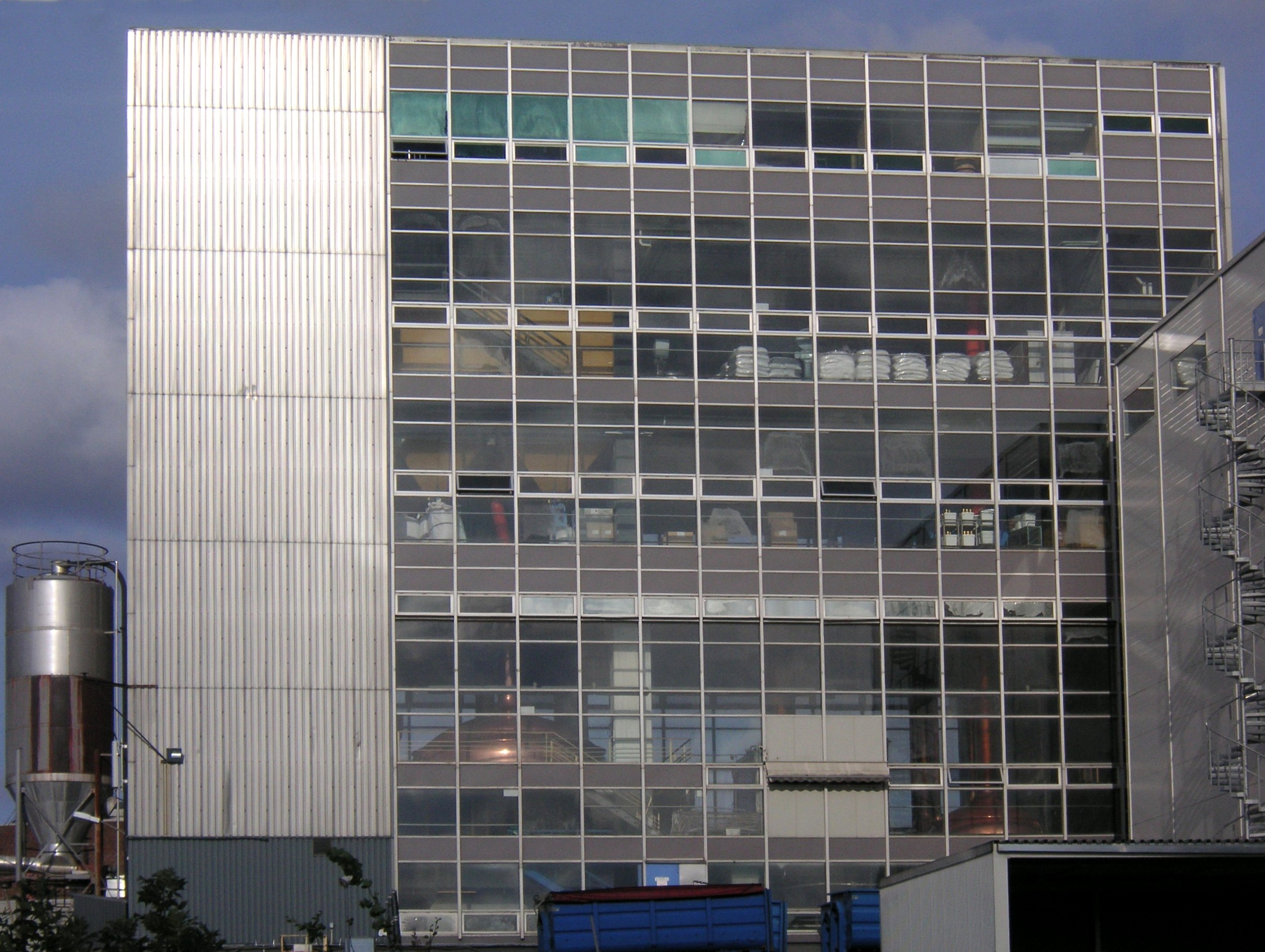 Wårby Bryggeriers byggnad i Vårby